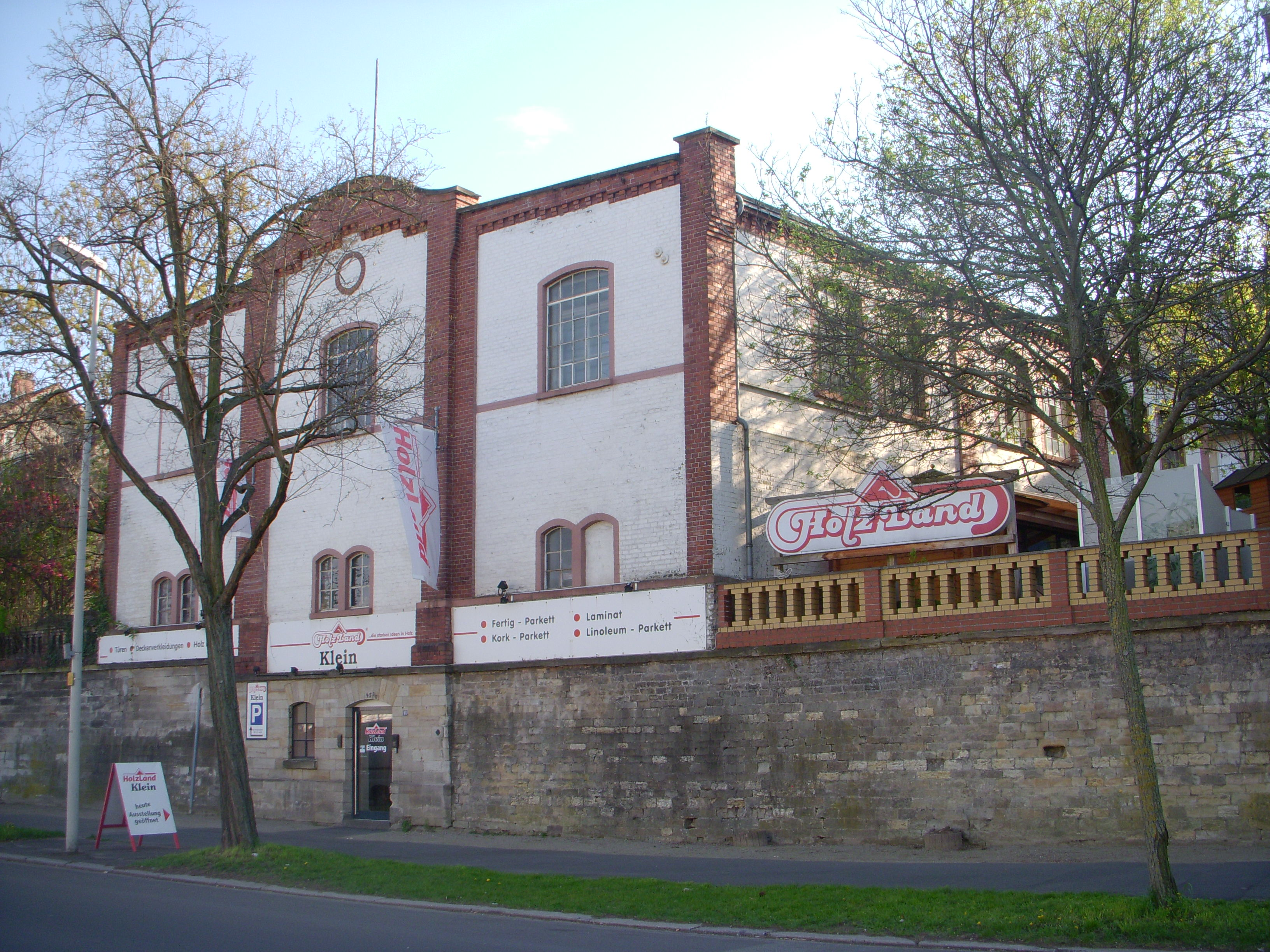 Armeekonservenfabrik Mainz, Mombacher Straße